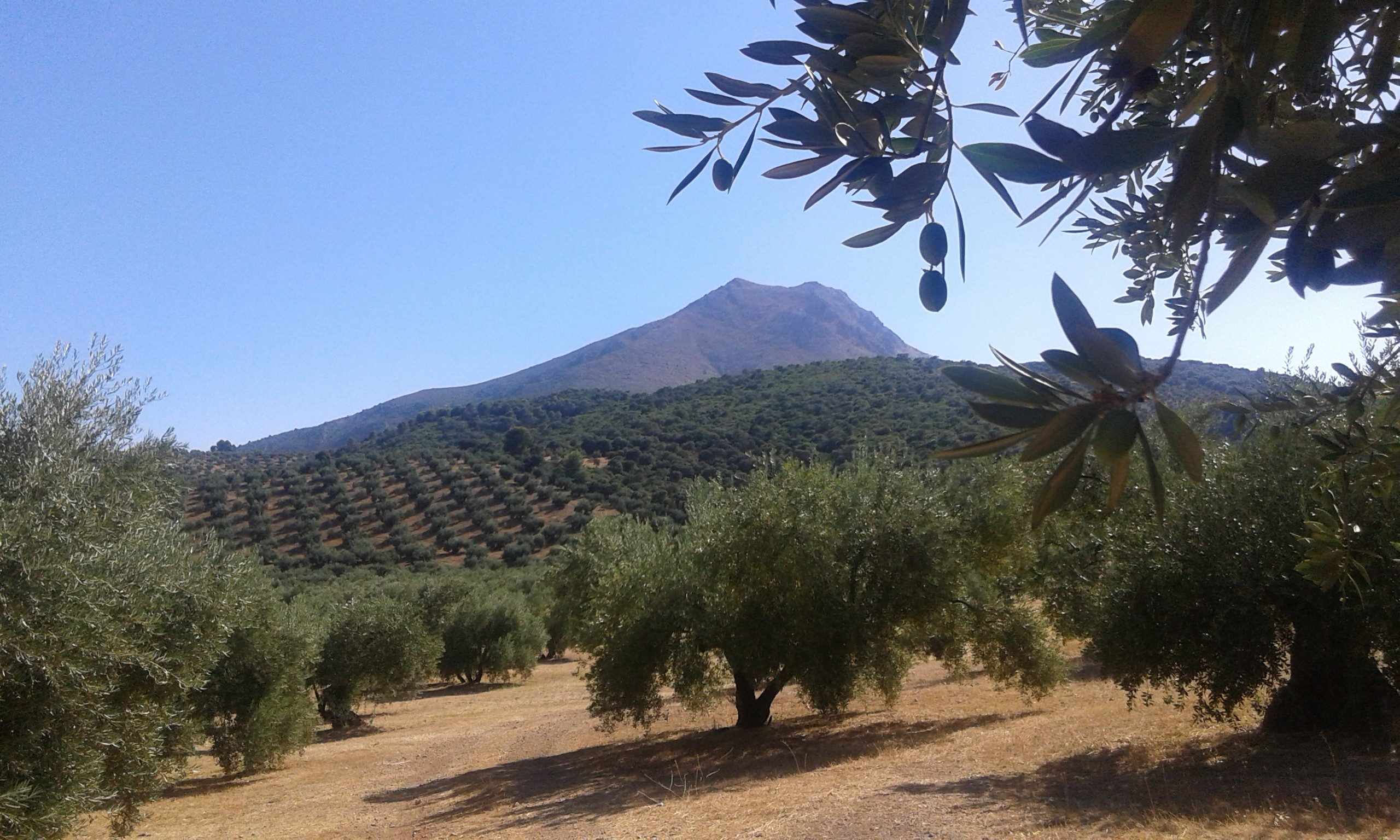 Imagen desde A-333 PK25 aprox. entre Priego de Córdoba y Las Lagunillas.